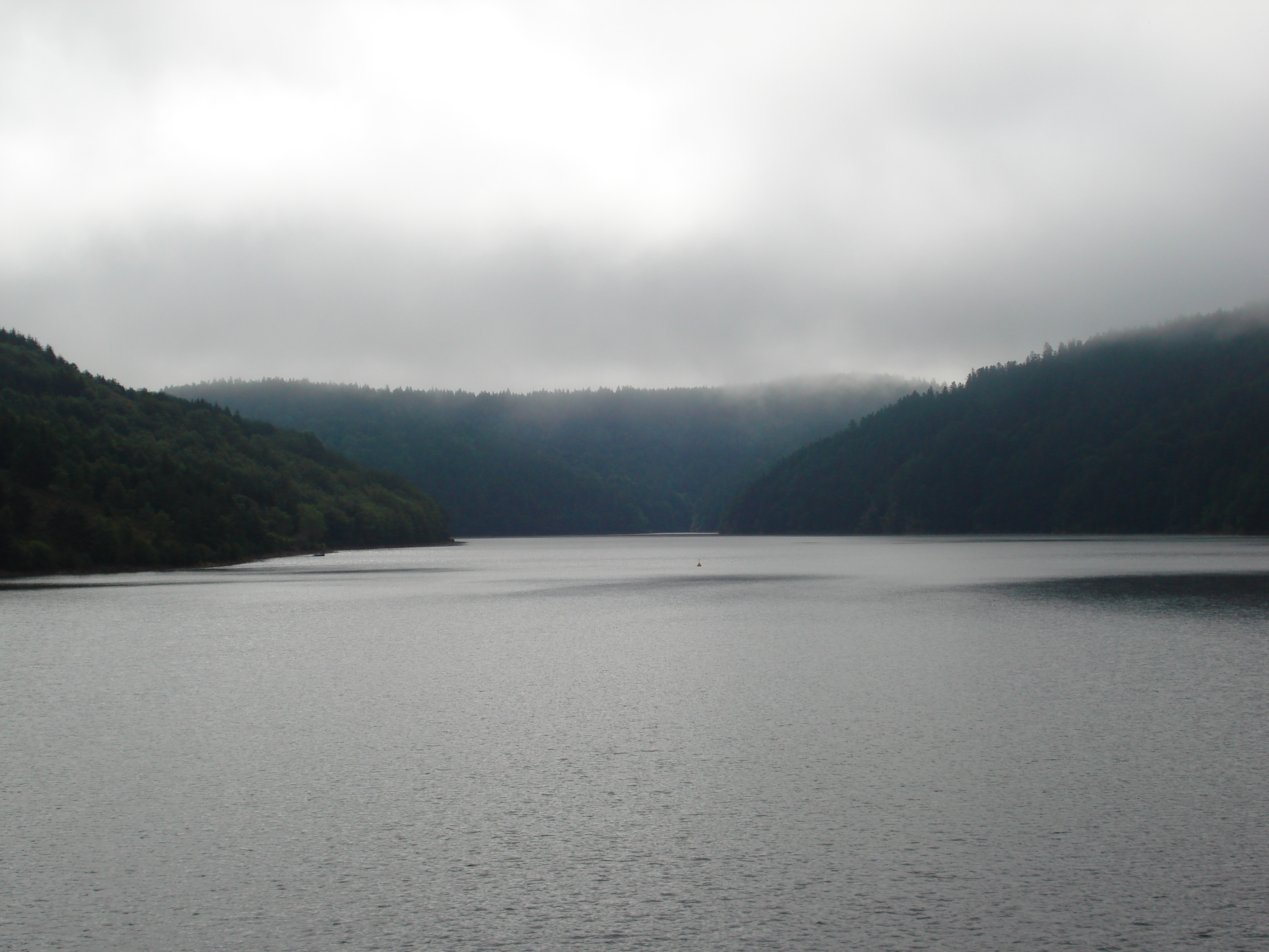 Barrage de Grandval